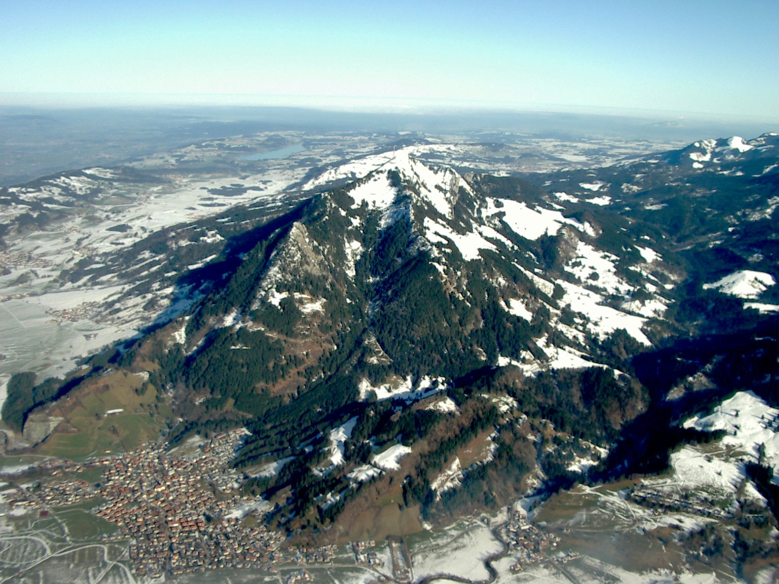 Grünten (Berg) im Allgäu Luftbild per Gleitschirm, lat=47.51275 lon=10.27221 ele=2200m